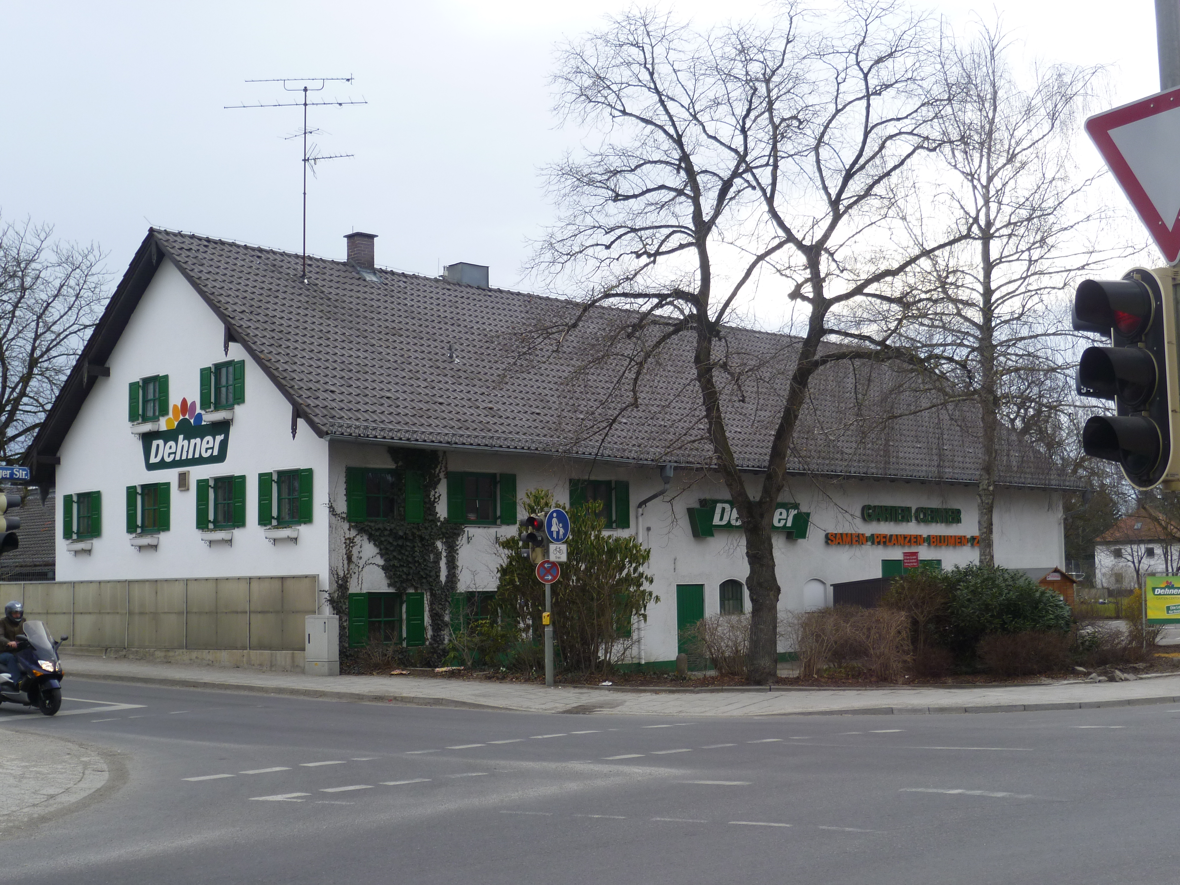 Kilihof in München-Trudering. Ältestes noch erhaltenes Bauernhaus in Trudering. Heute Dehner Garten-Center Filiale. Kirchtruderinger Straße 20, München